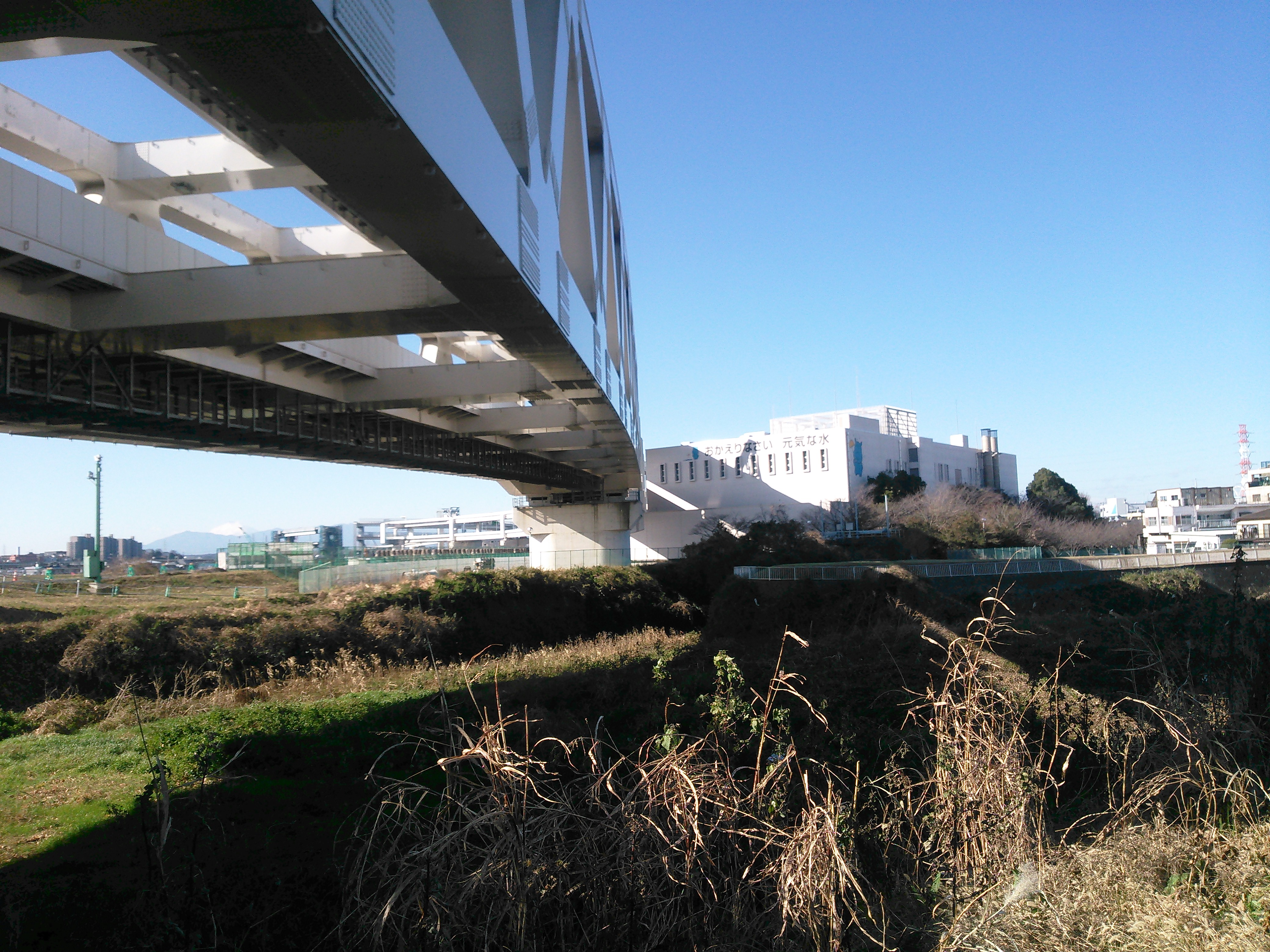 横浜市都筑区・港北区、大熊川トラス橋と横浜市下水道局川向ポンプ場。